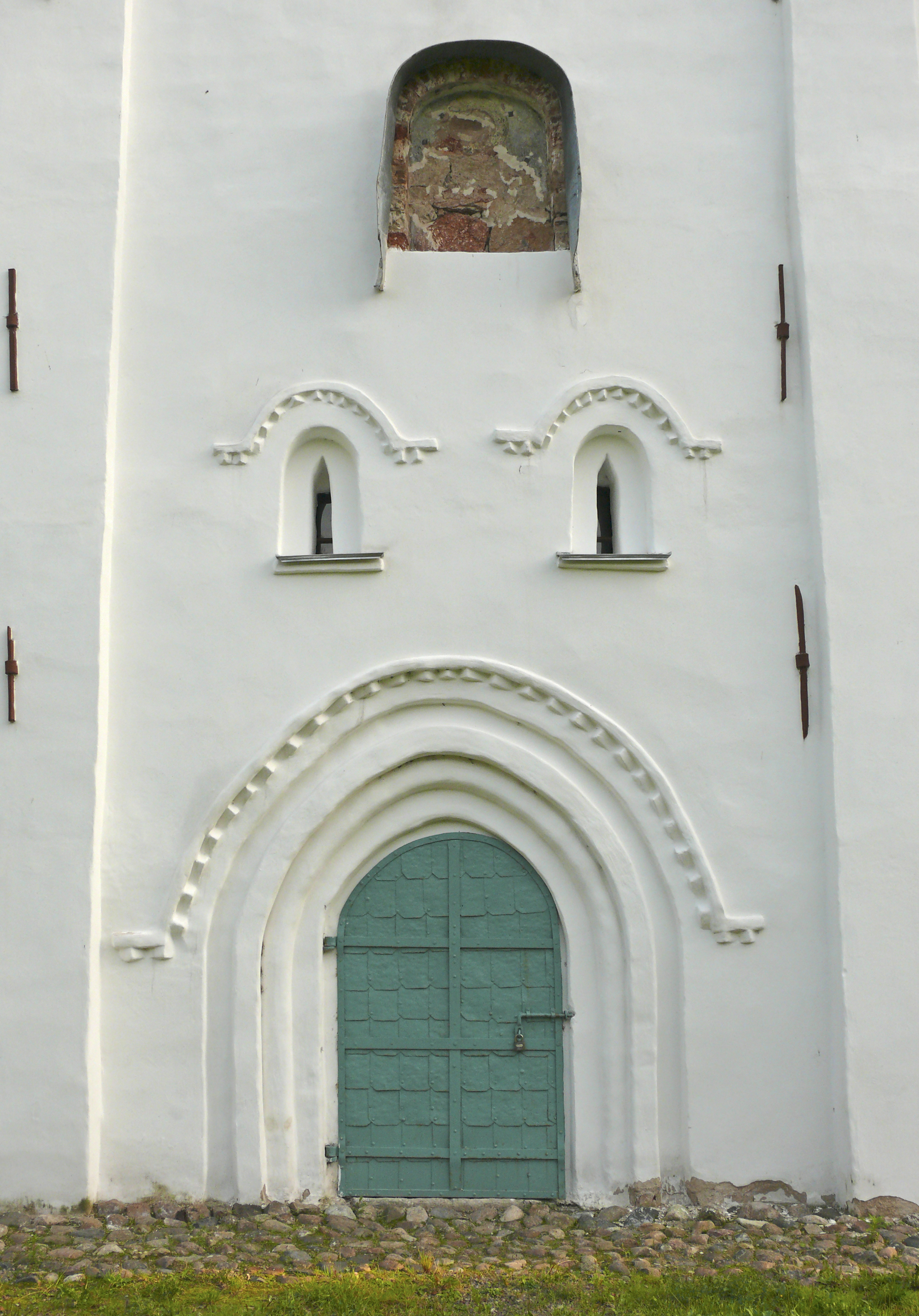 Остатки фрески «Священномученик Власий» в нише над северным порталом церкви Власия в Великом Новгороде